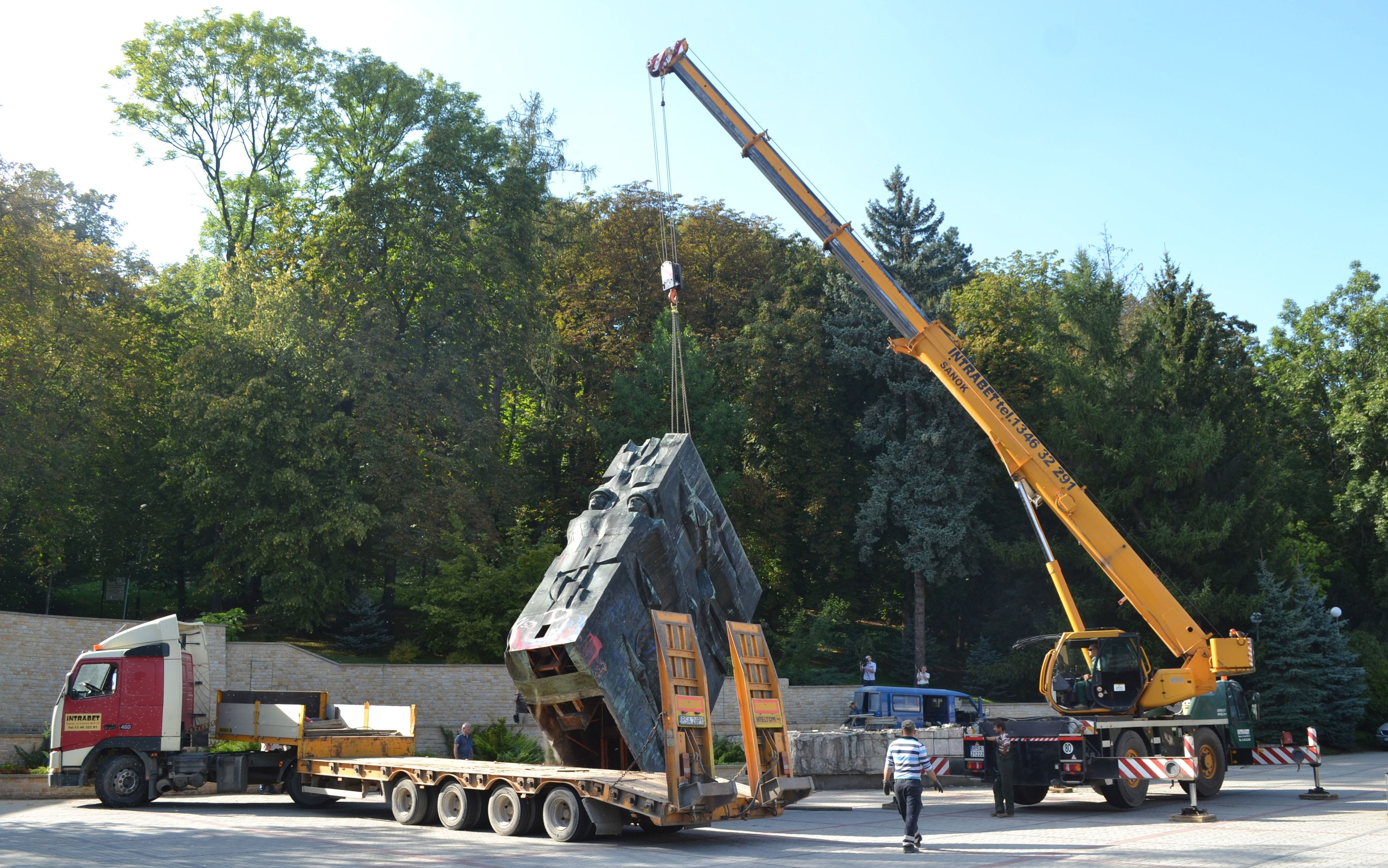 Die Demontage des Denkmals für sowjetische Soldaten in Sanok